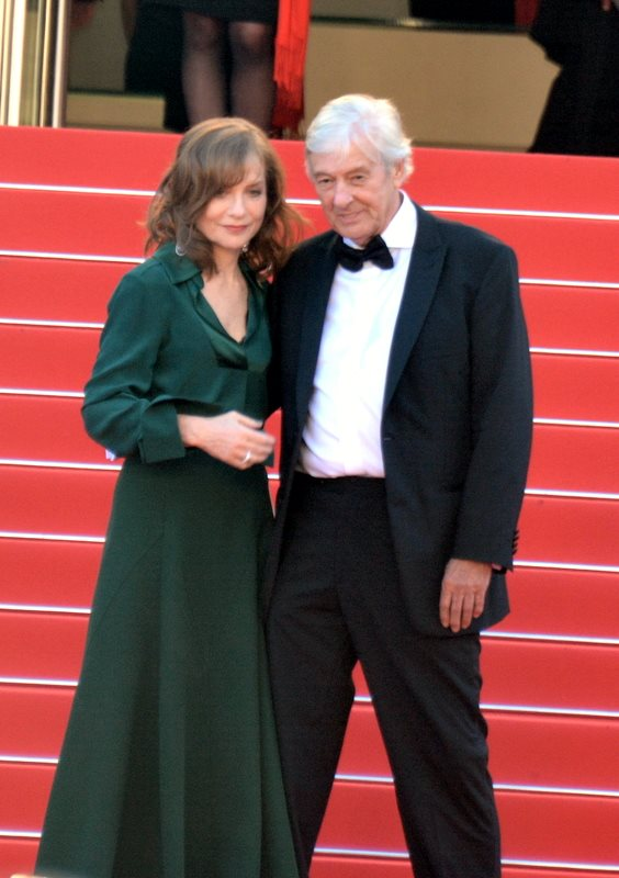 Isabelle Huppert et Paul Verhoeven lors de la présentation de "Elle" au festival de Cannes